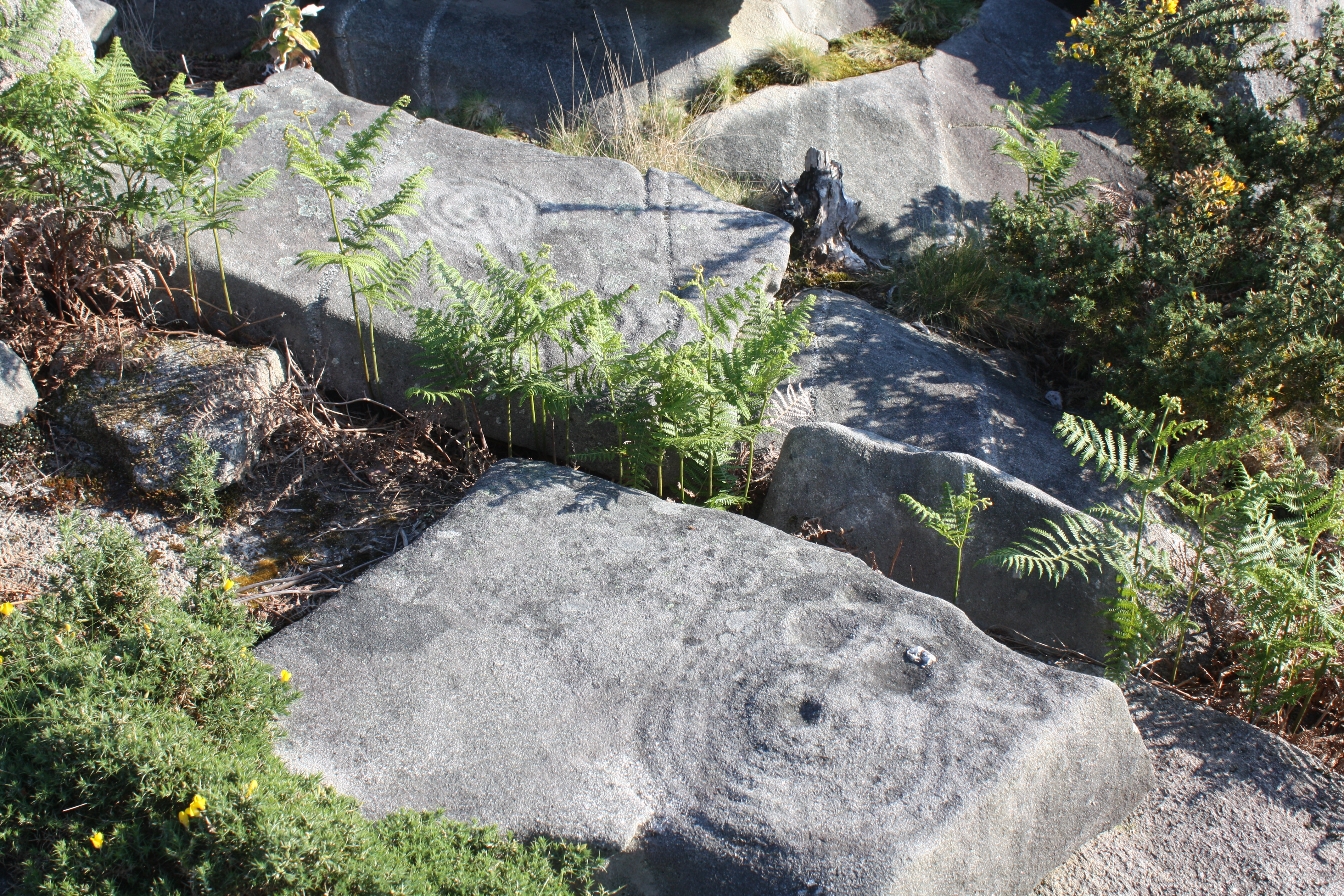 Petróglifos do Outeiro da Tartaruga (Samiera, Poio, Pontevedra)